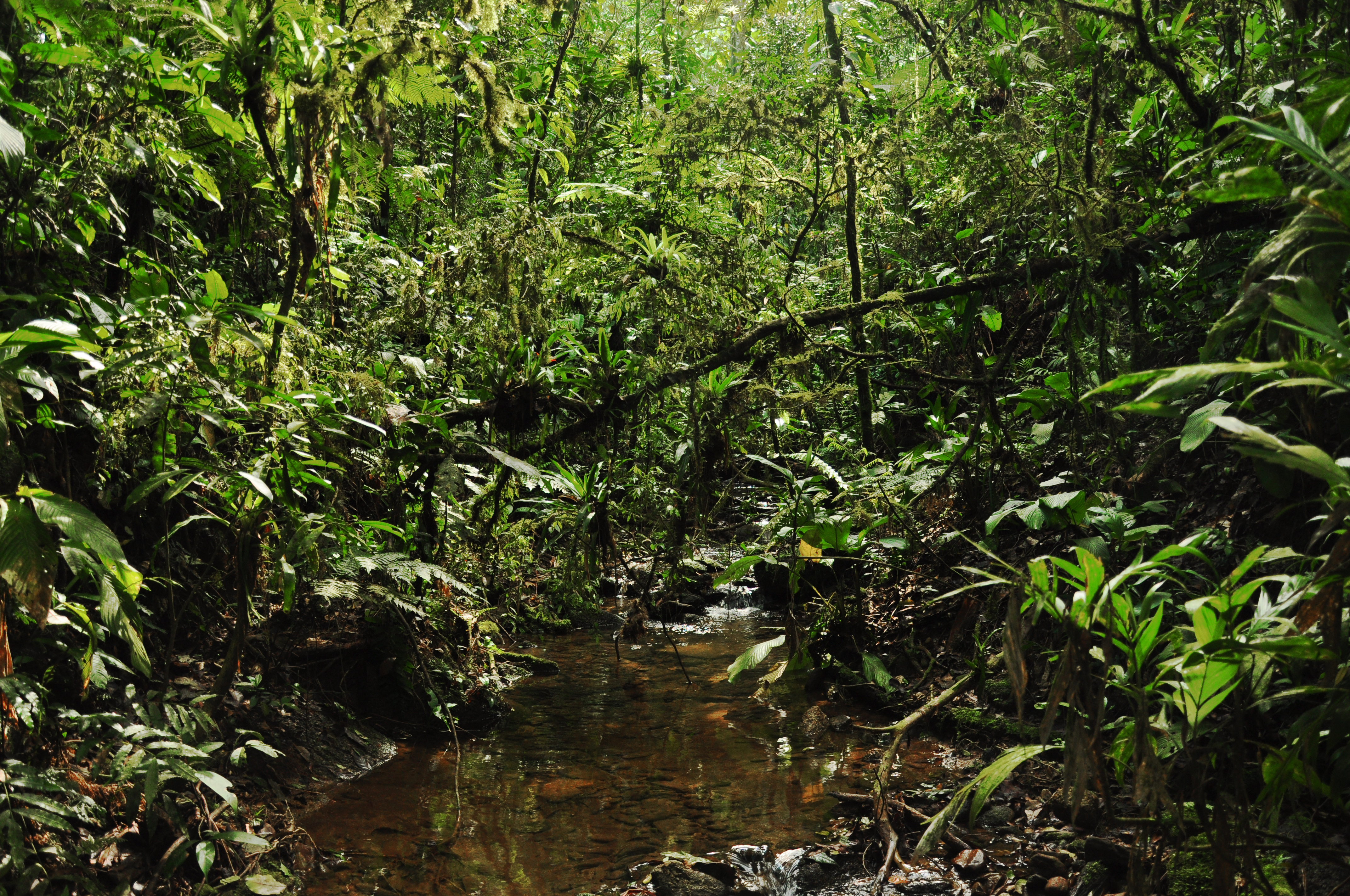 Paisagem comum encontrada nos interiores das matas do Parque Estadual Intervales.